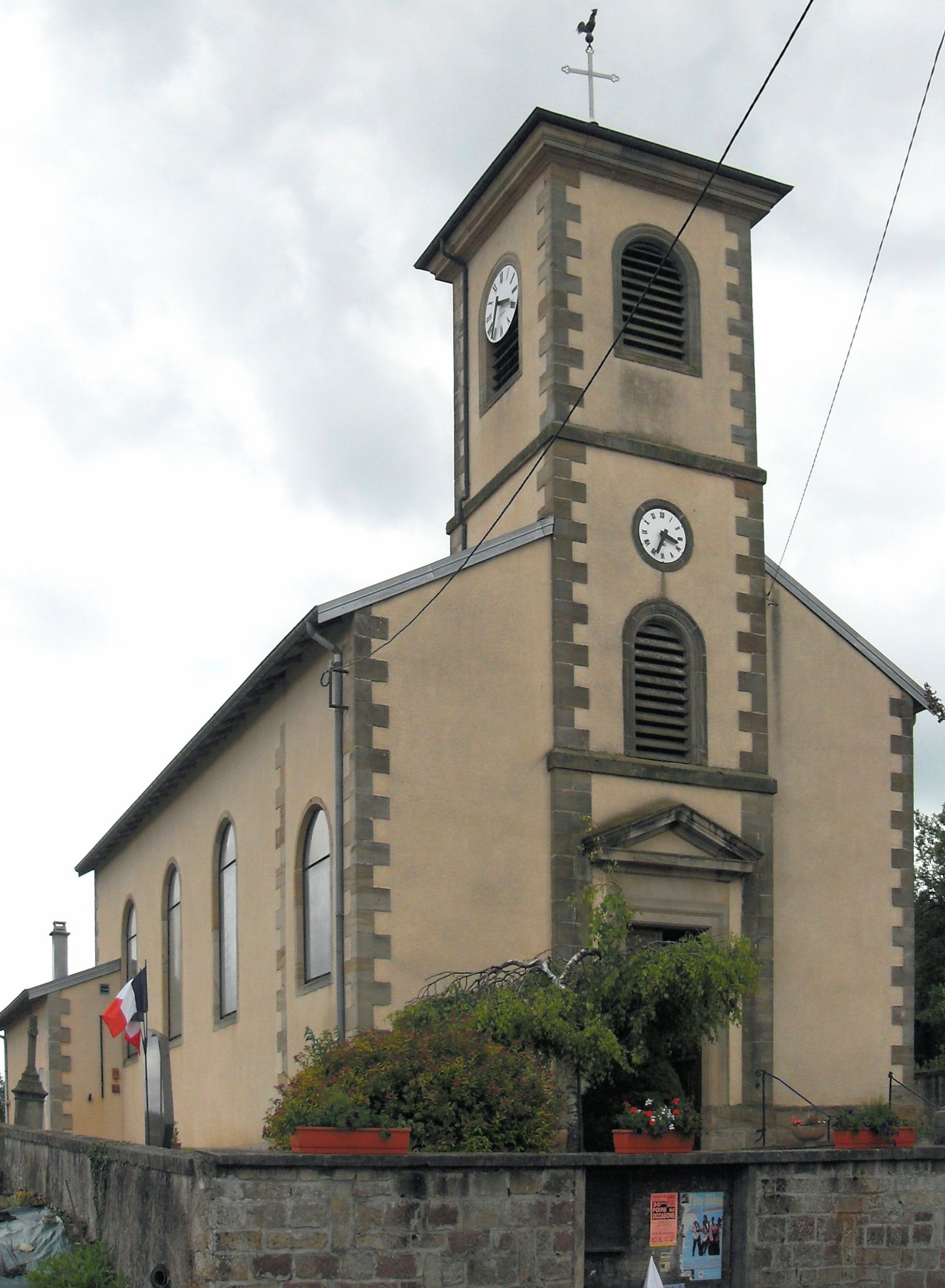 L'église Saint-Claude à Circourt